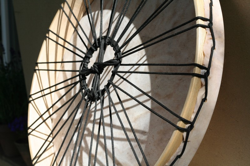 Naciąg bębna szamańskiego wykonanego współcześnie